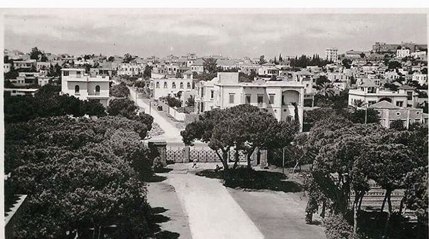 صورة لمنطقة رأس النبع في بيروت-لبنان عام1860